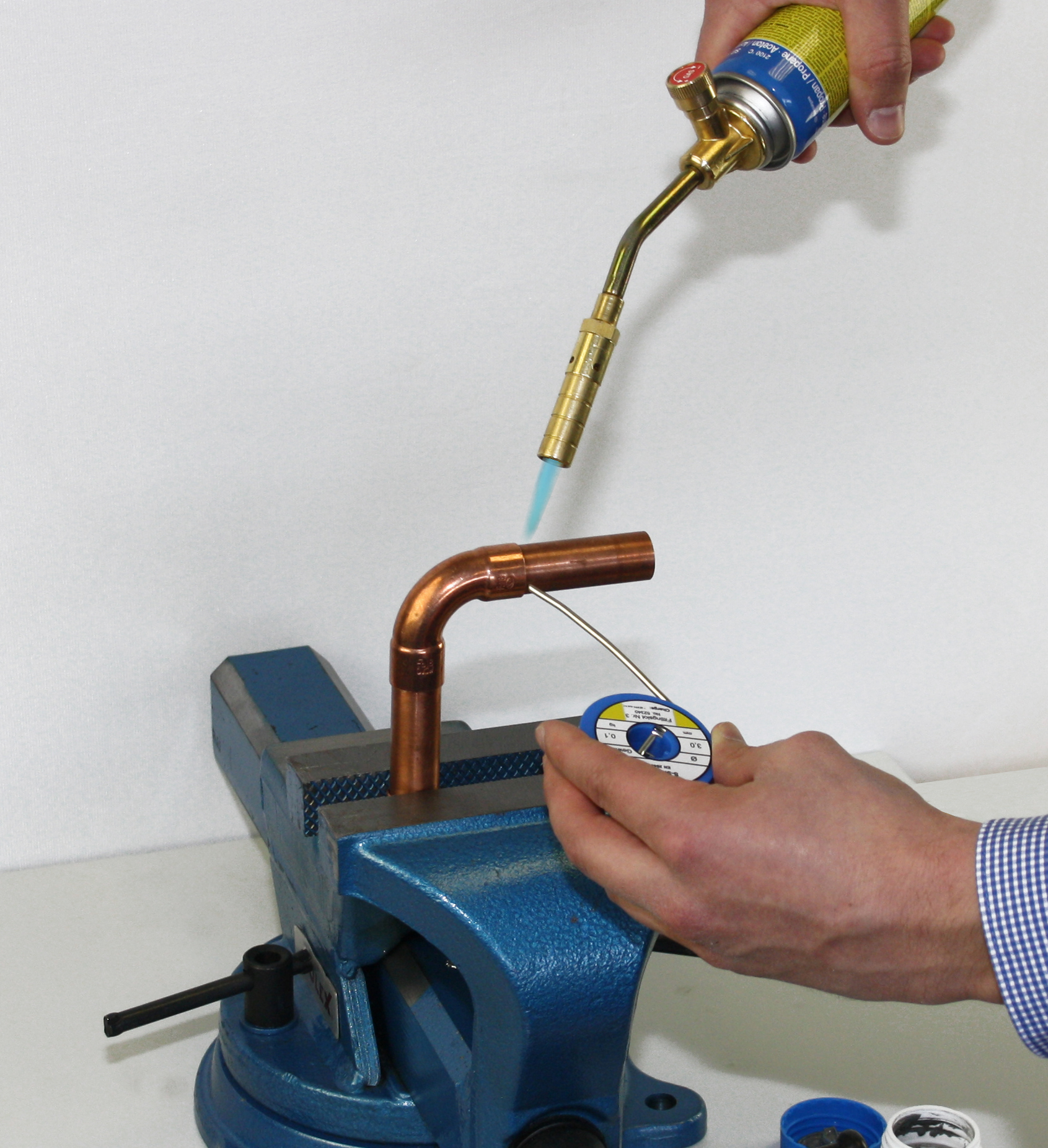 Hier ist die übliche Anwendung eines Lötbrenners beim Löten eines Kupferrohrs zu sehen.